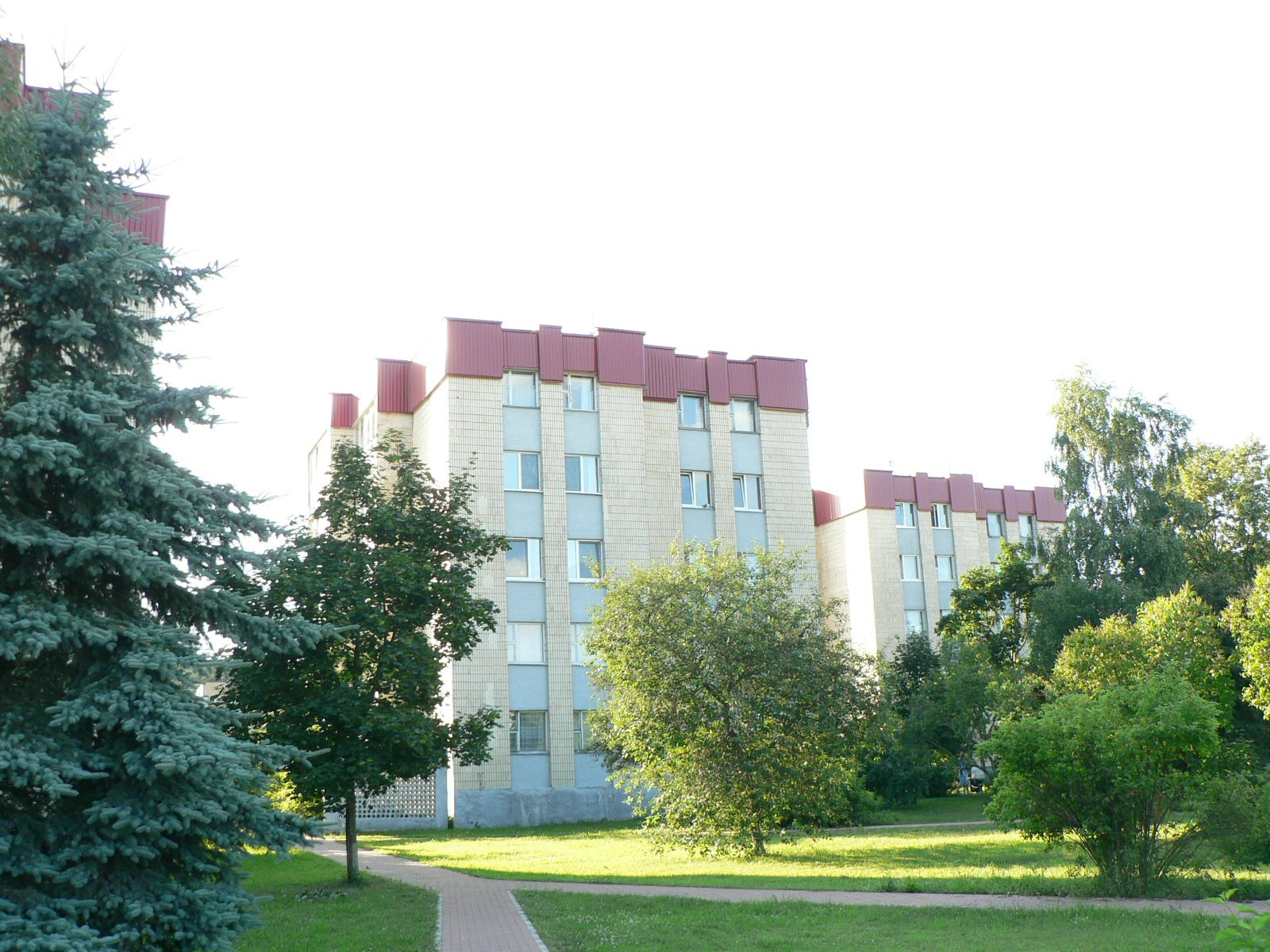 Bloki mieszkalne przy centralnym placu w Kupie. Беларуская (тарашкевіца): Жылыя домы ля галоўнай плошчы Купы.